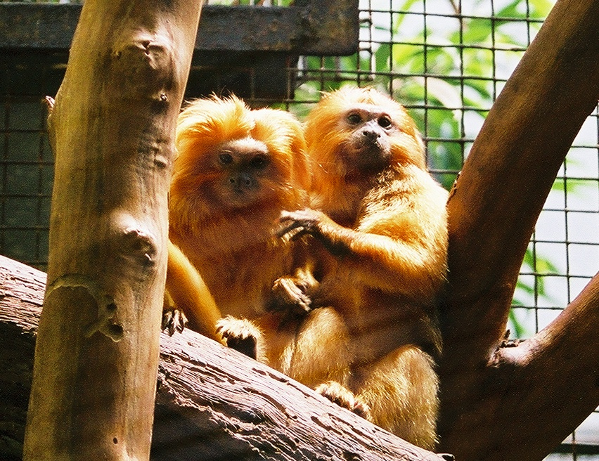 moooo